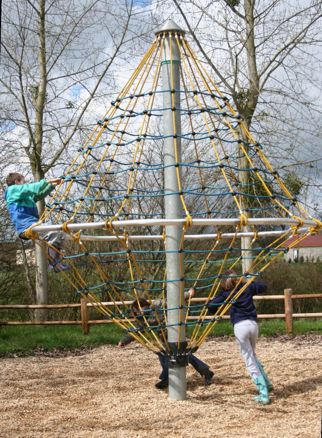 public parc Bucey-lès-Gy 70700 Haute-Saône France